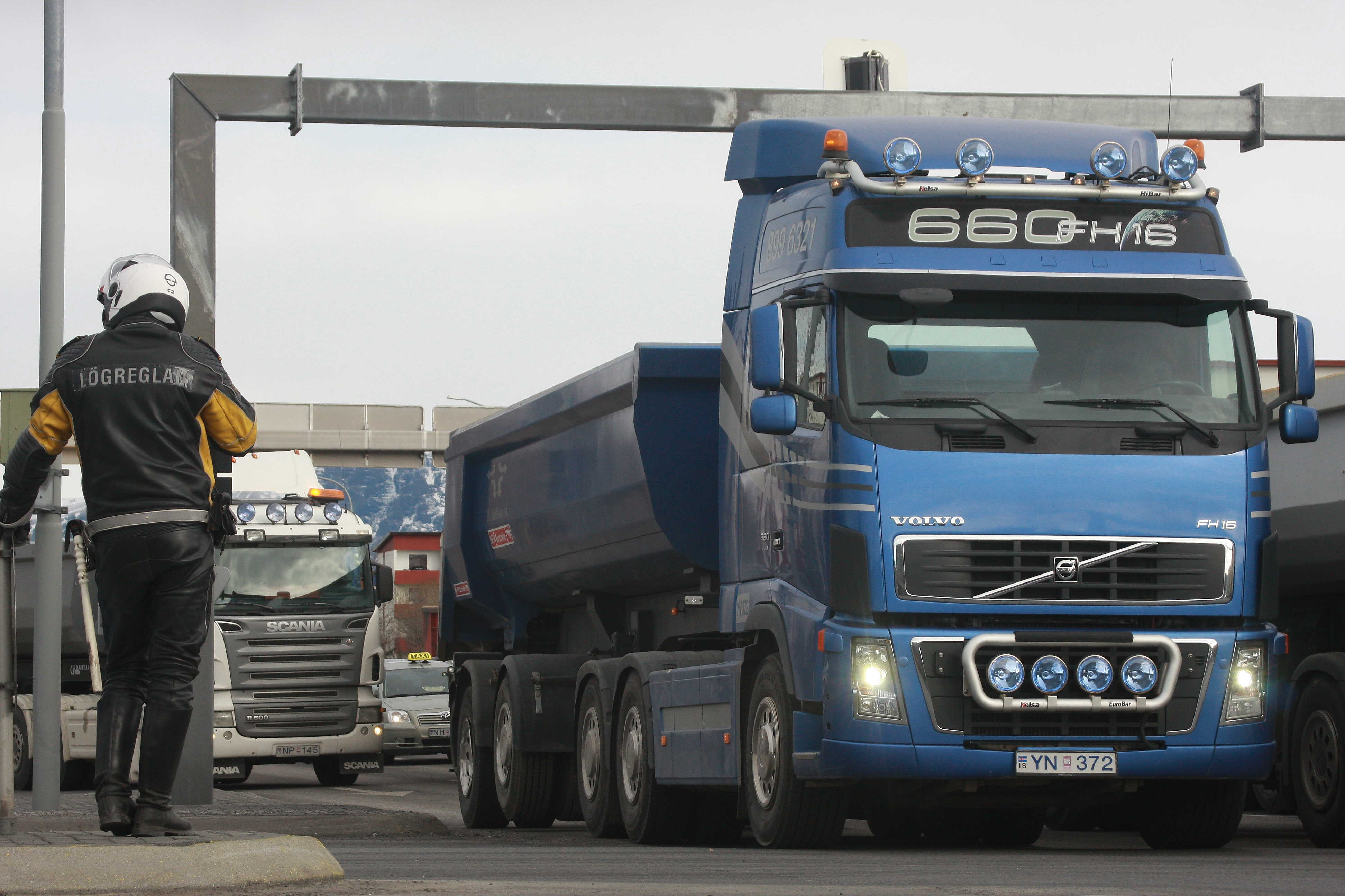 Bílaumferð á Kringlumýrar- og Miklubraut stöðvaðist algerlega í um hálfa klukkustund í dag þegar bílstjórar um 70 til eitt hundrað vörubifreiða efndu til aðgerða, annan daginn í röð.